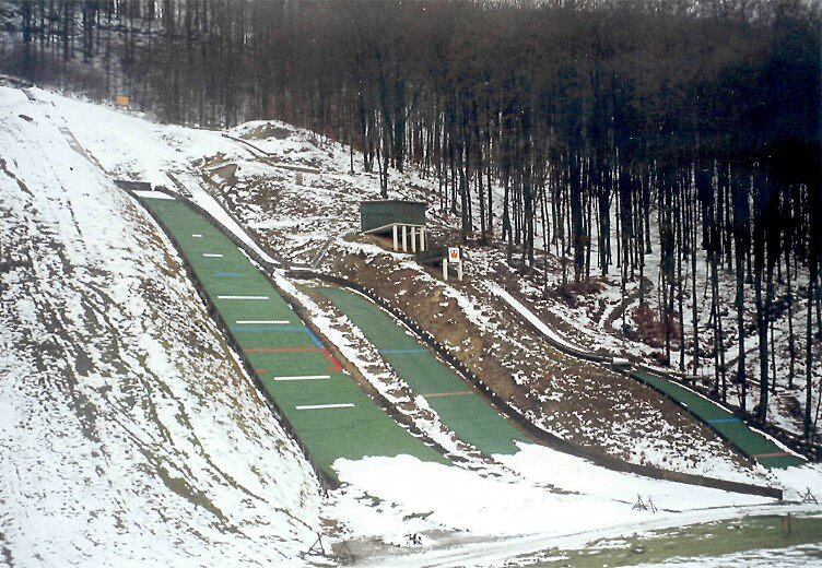 Kreuzbergschanze in Haselbach, Winter